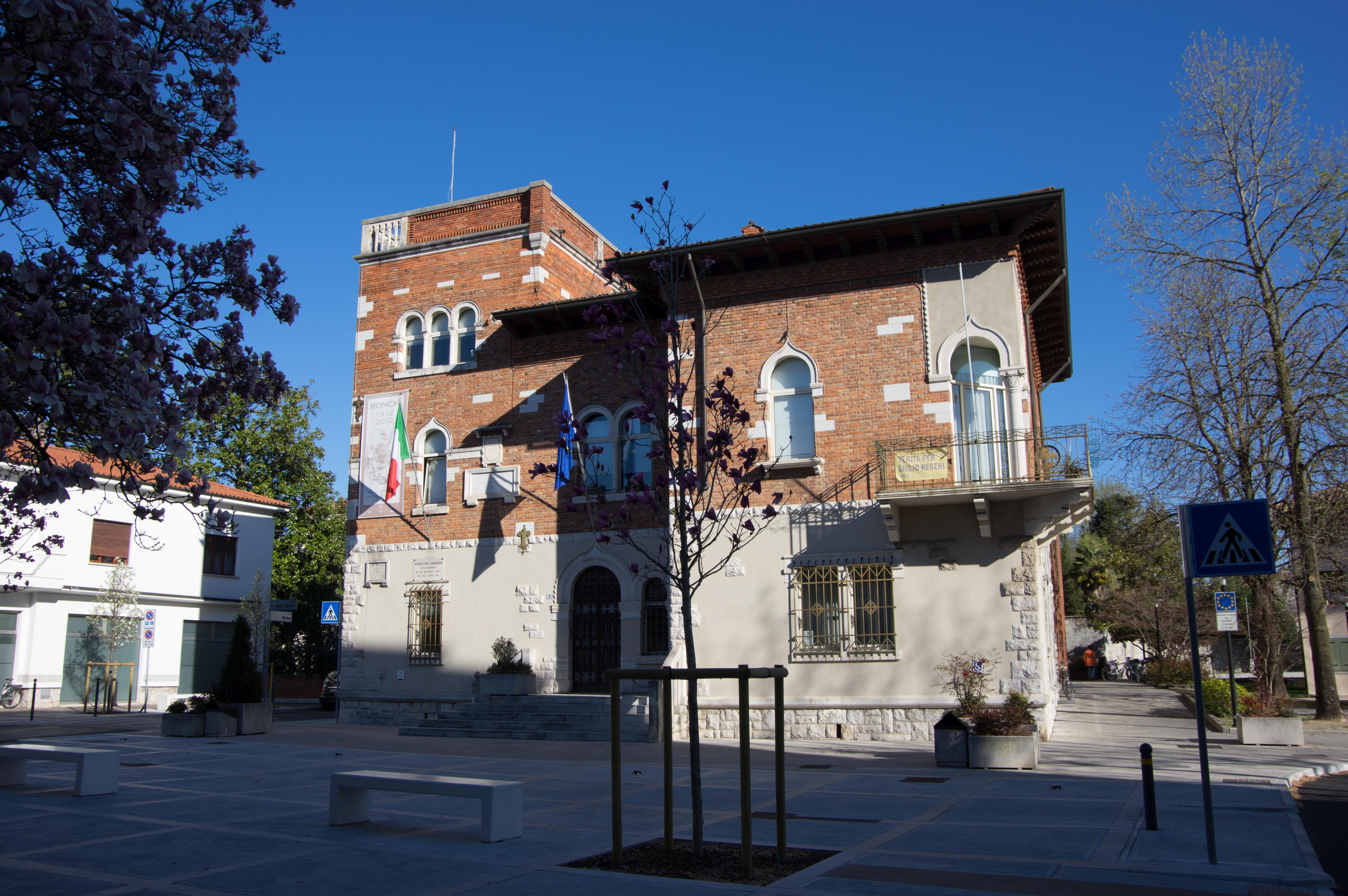 Ronchi dei Legionari in der Provinz Görz in Norditalien. Eine Villa in der Ortsmiite